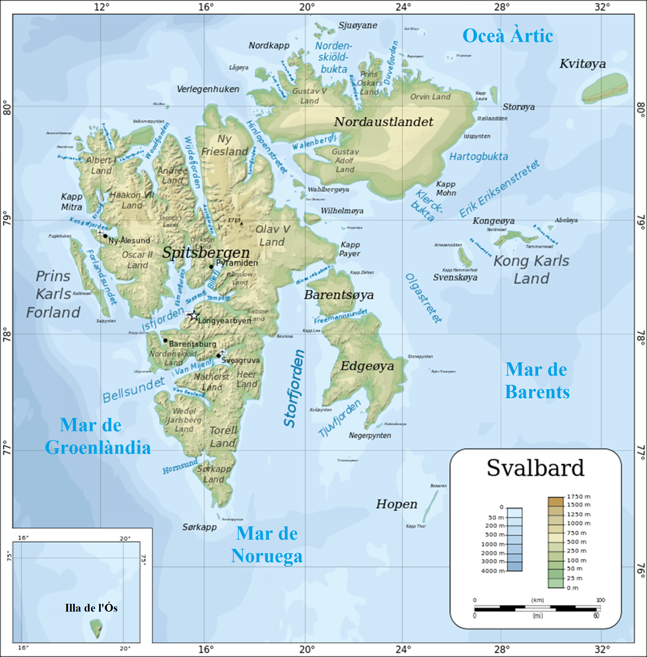 Mapa topogràfic de Svalbard en català. El fitxer original en anglès és aquest